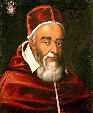 Pope Leo XI